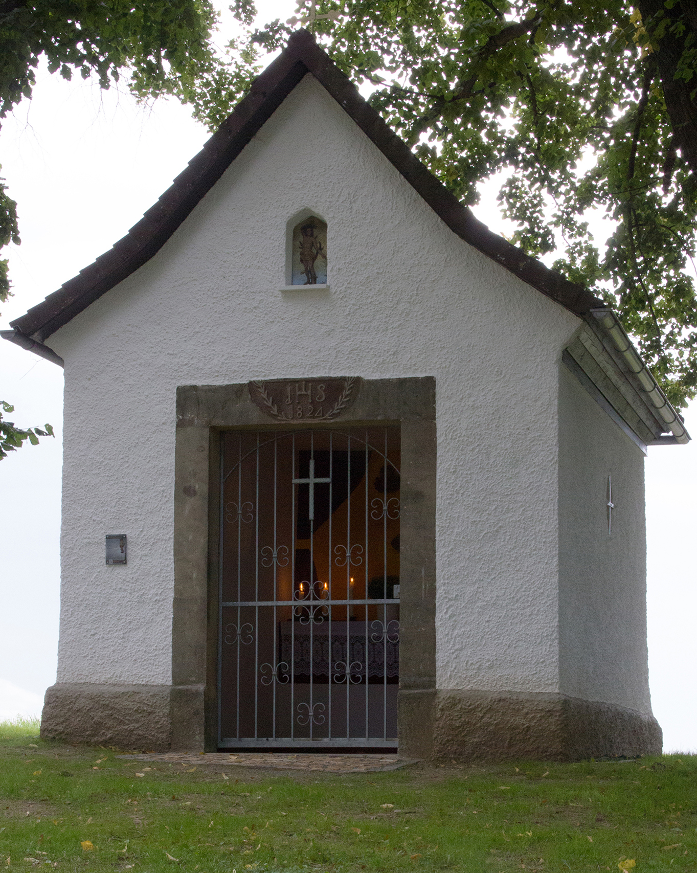 Nordwestansicht der Sebastian-Kapelle zu Kupferberg (Aufnahme August 2017)